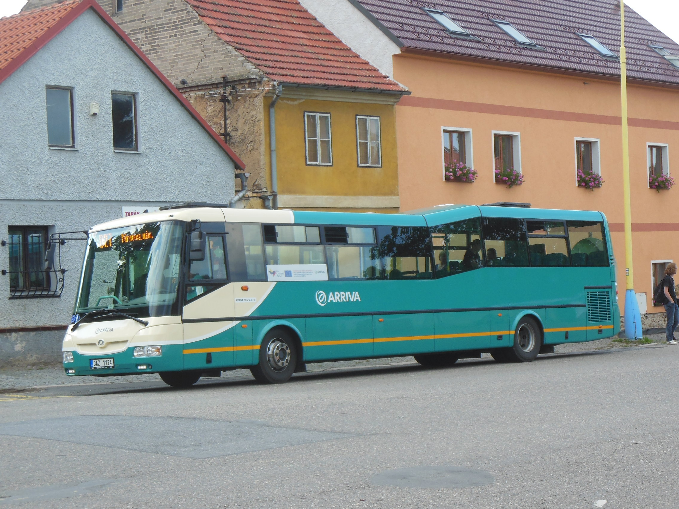 Milín (okres Příbram). Autobusová zastávka Milín, autobus SOR CN 12 dopravce Arriva Praha.